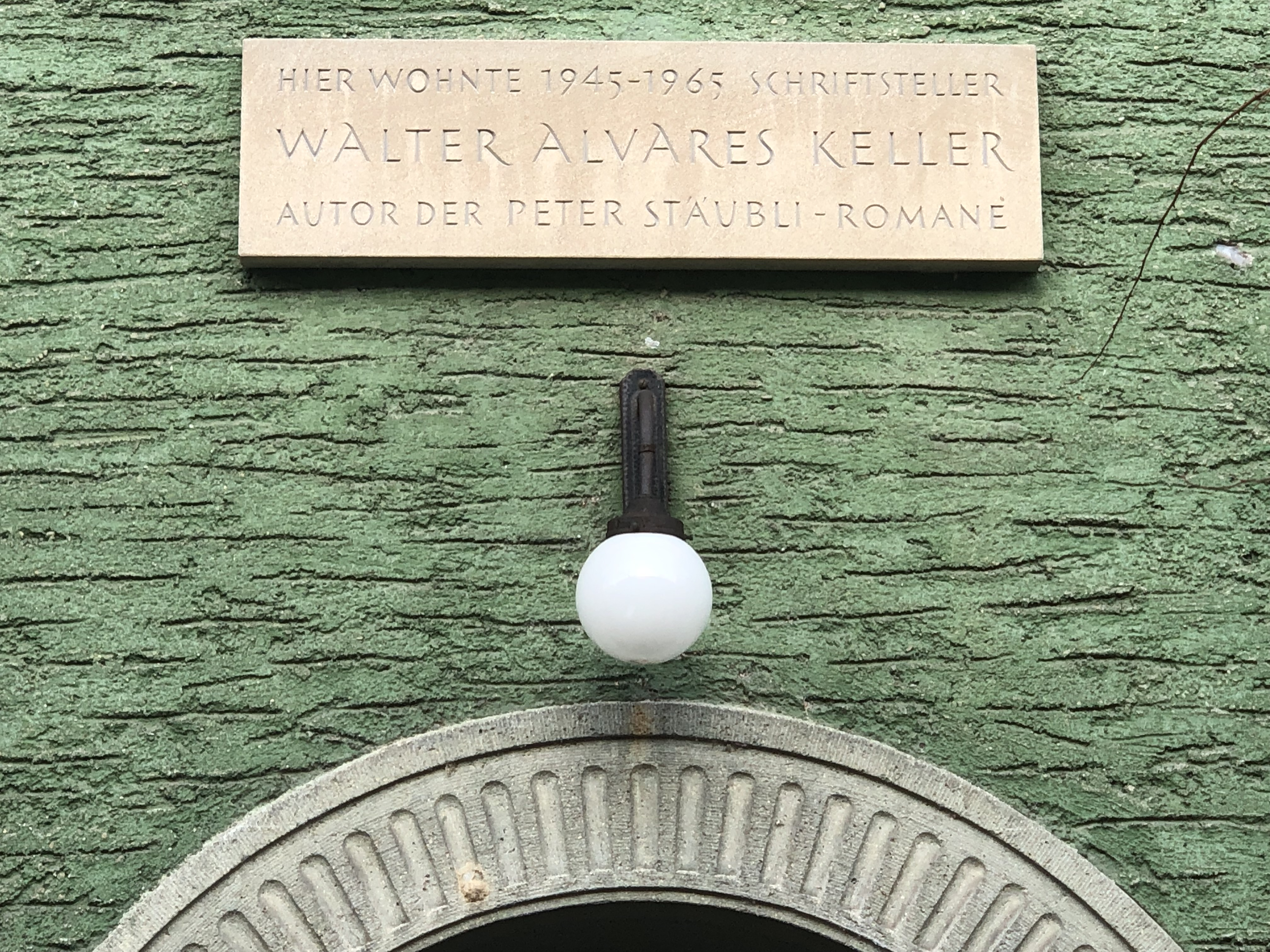 Tafel am Wohnhaus von Walter Alvares Keller an der Heinrich-Federer-Strasse 6 in Zürich-Wollishofen